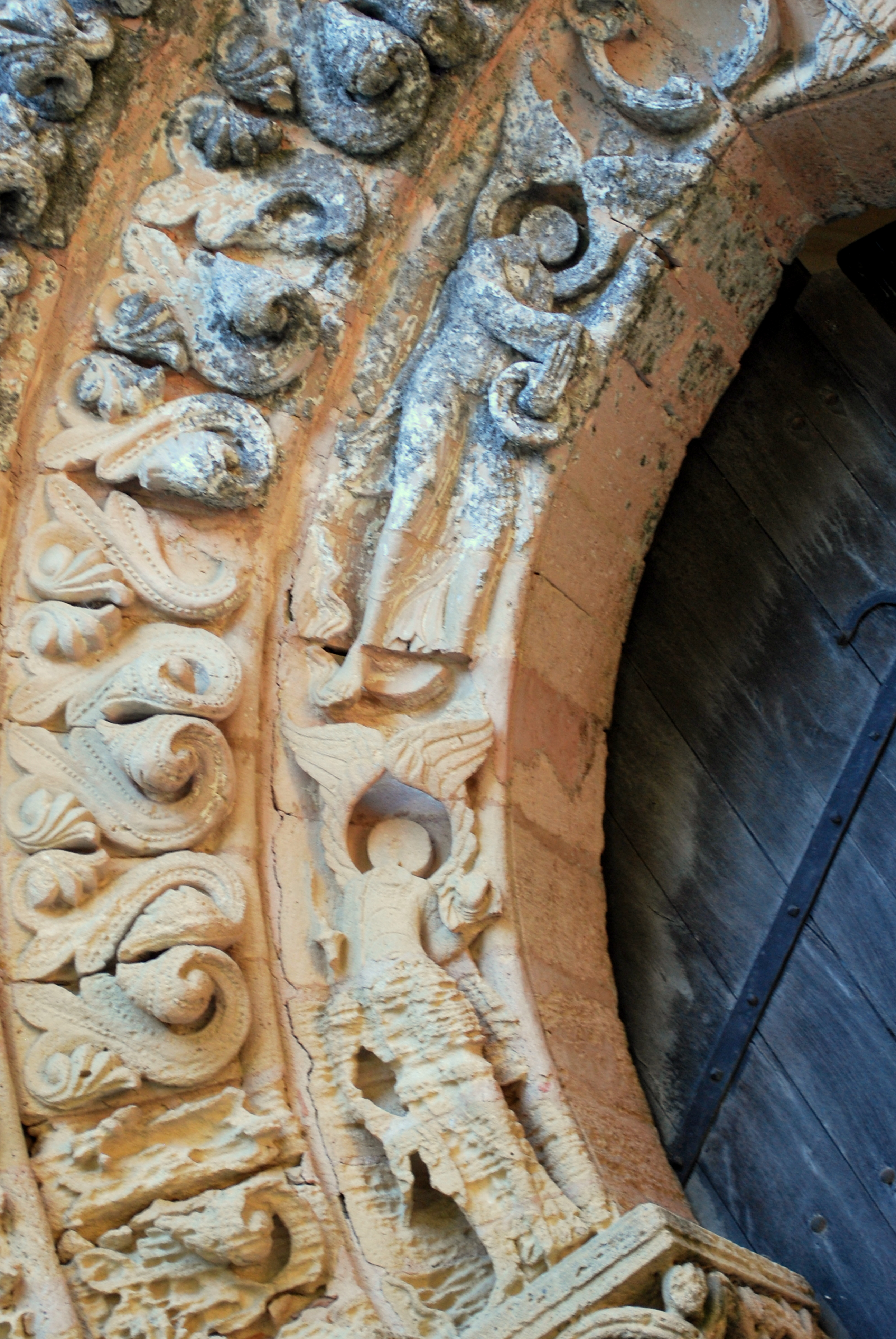 Blasimon église St Nicolas Voussure